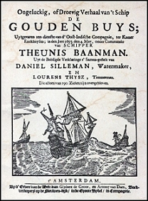 Titelpagina reisverhaal De Gouden Buys uit 1695, heruitgave 1968 Pretoria Zuid Afrika